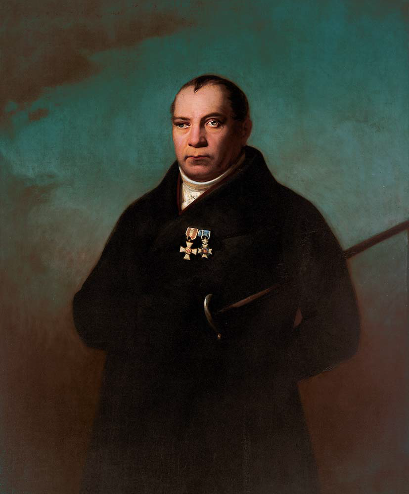 Johann Richard Seel, Johann Rütger Brüning (1775–1837), 1844, von der Heydt-Museum